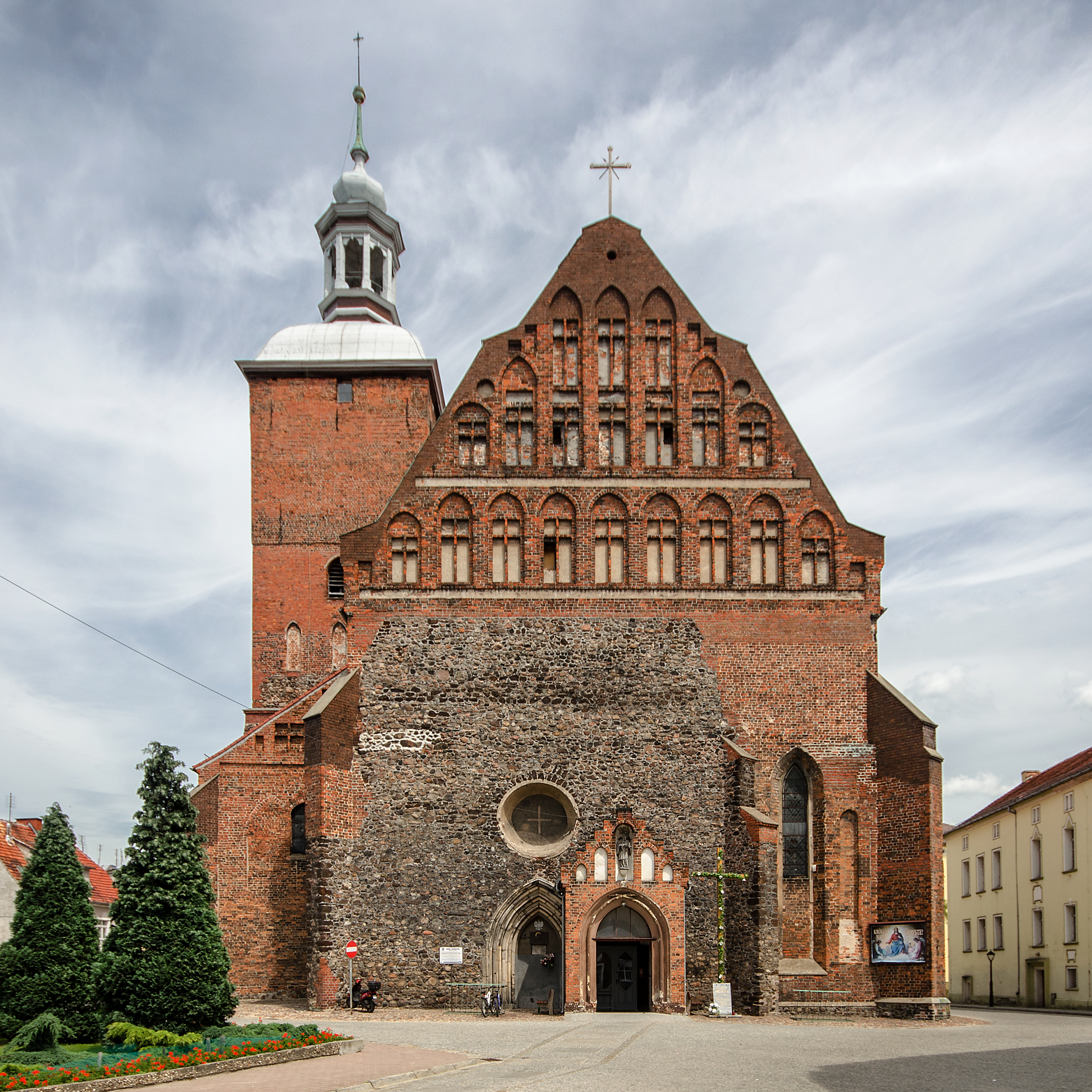 Szprotawa, kościół par. p.w. Wniebowzięcia NMP, XIII/XIV, XV, XVII